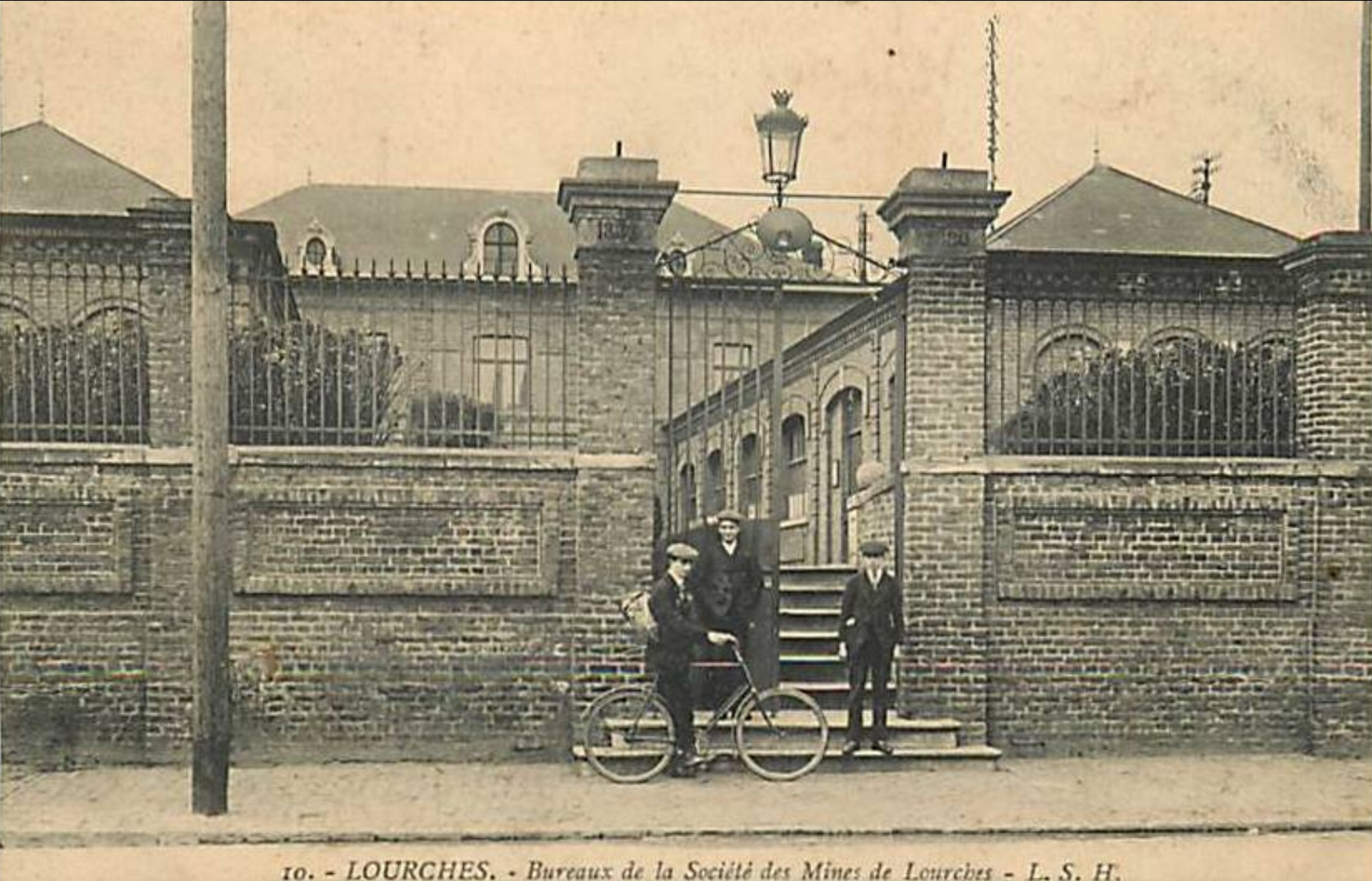 Grands bureaux de la Compagnie des mines de Douchy, Lourches, Nord, Nord-Pas-de-Calais, France.